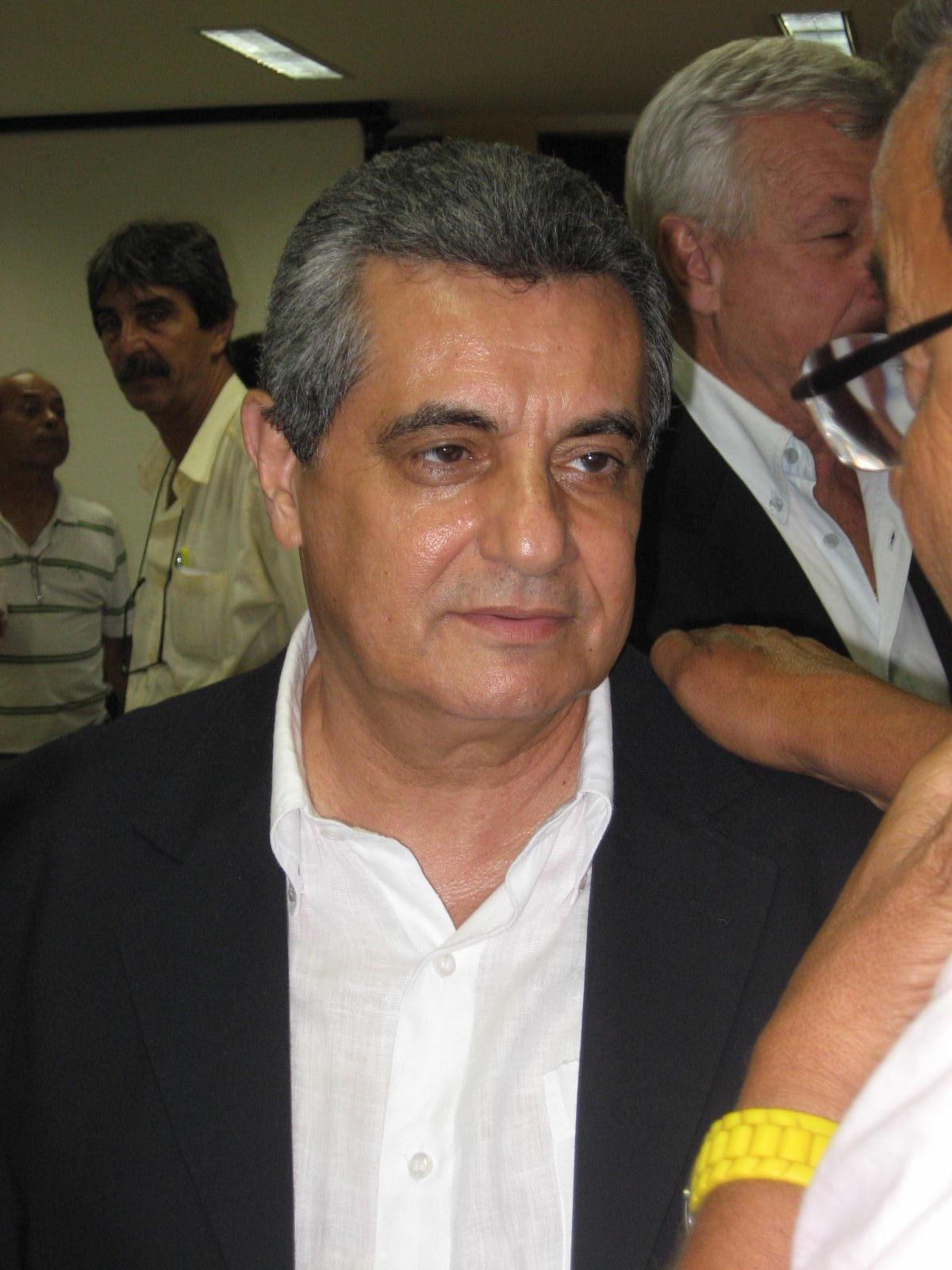 O presidente da Federação de Futebol do Estado do Rio de Janeiro (FFERJ) Rubens Lopes.